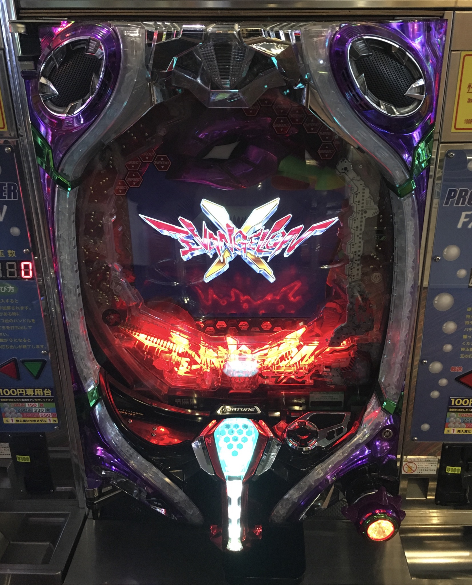 CRエヴァンゲリオンXの台